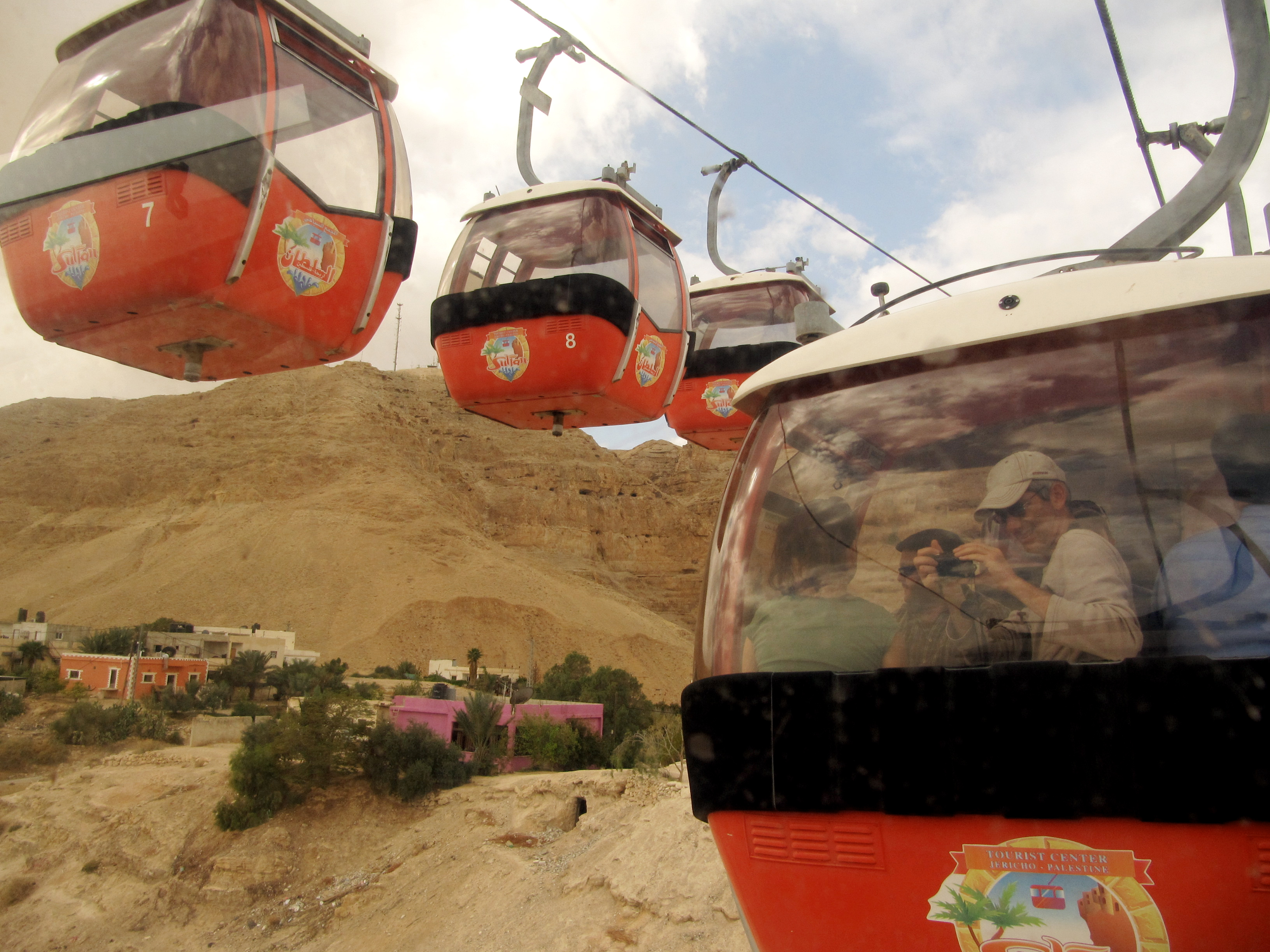 Jericho (more details in the photo's title) יריחו (מידע נוסף בשם הקובץ)